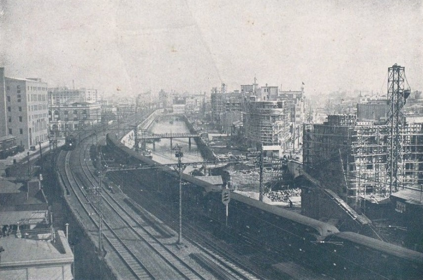 新橋駅から銀座を望む